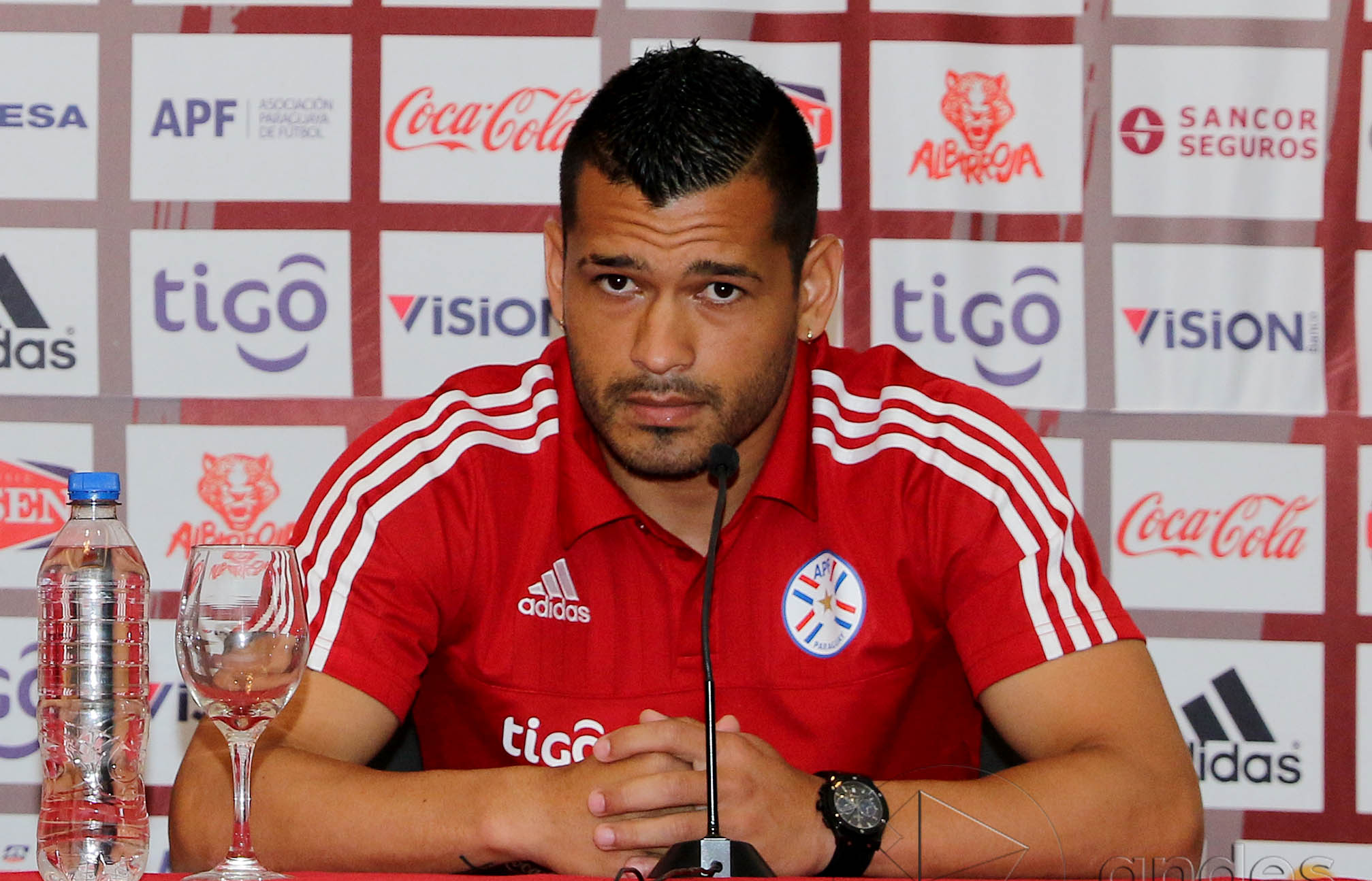 Guayaquil 23 de marzo del 2016 (Andes).-Néstor Ortigoza y Miguel Samudio, jugadores de la selección paraguaya de fútbol, durante la rueda de prensa que ofrecieron en Guayaquil. Foto:Andes/César Muñoz